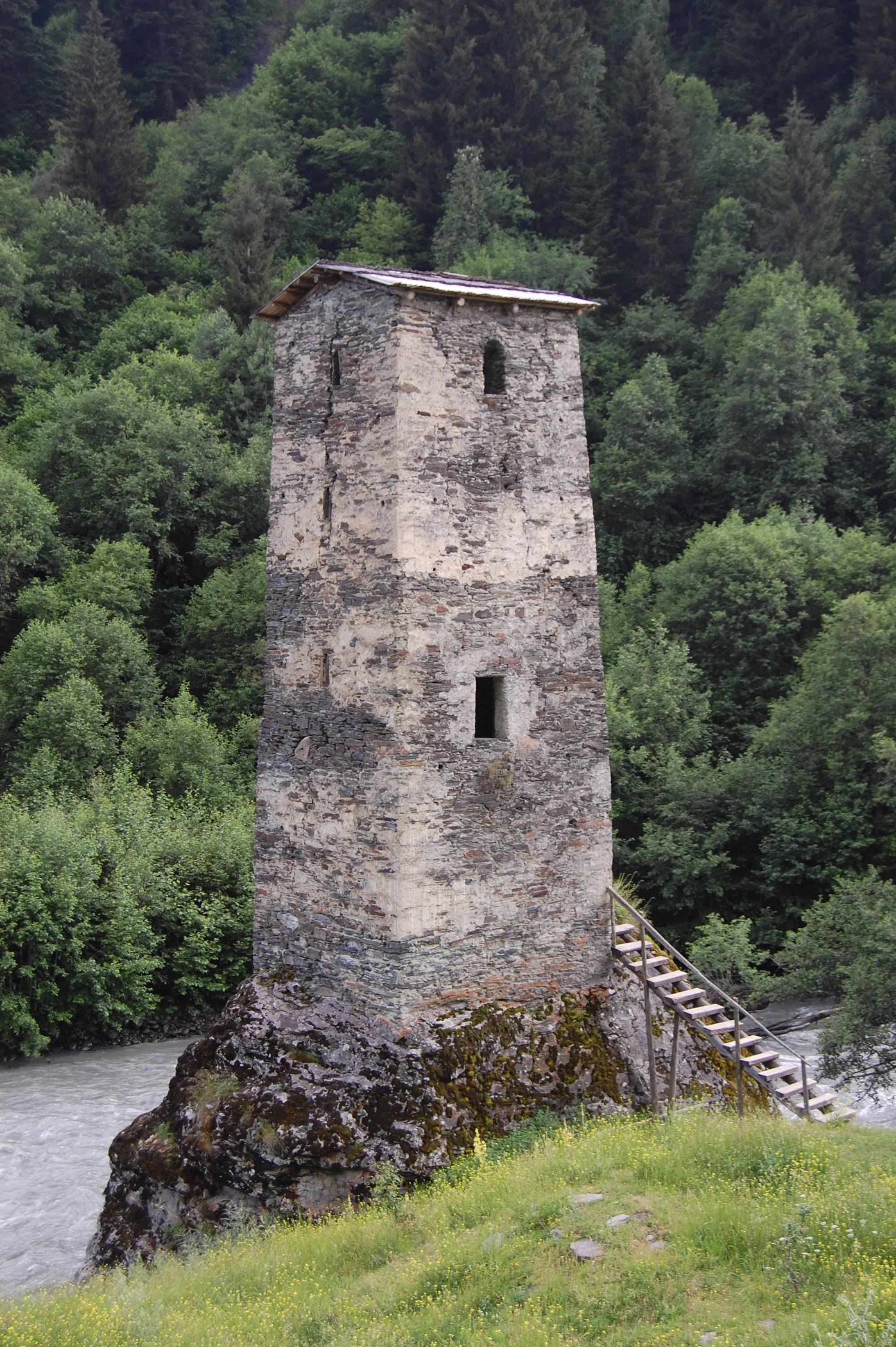 Svaneti - Tower Georgia - Sakartvelo